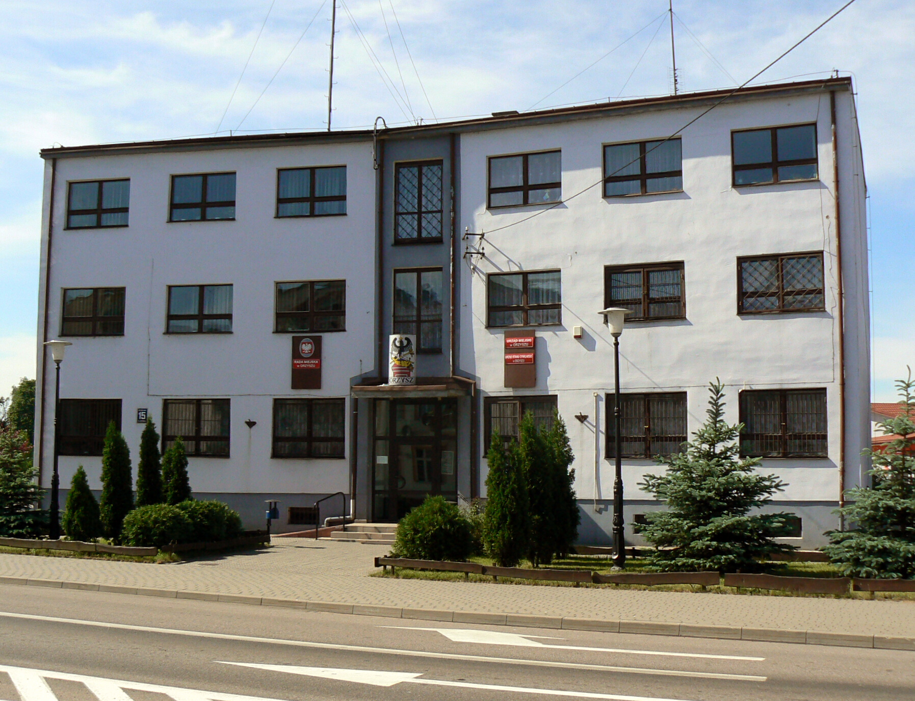 Budynek Urzędu Miejskiego w Orzyszu